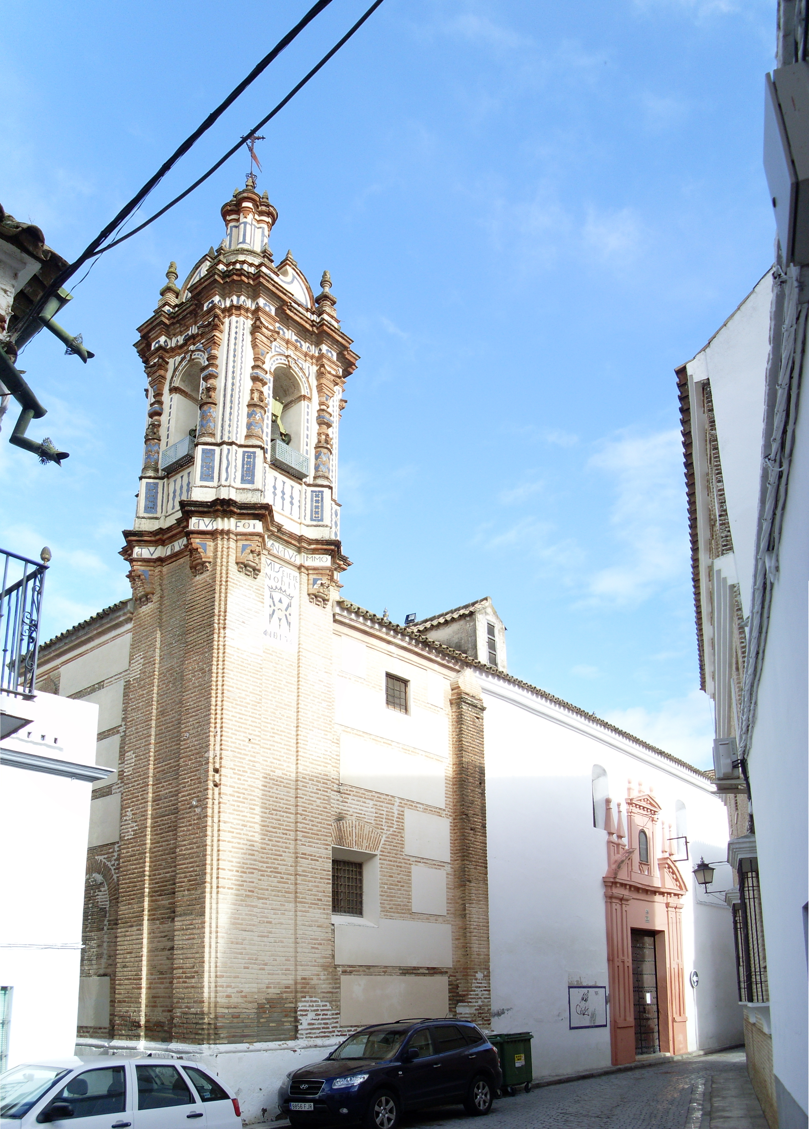 Convento de la Santísima Trinidad y Purísima Concepción de Écija.